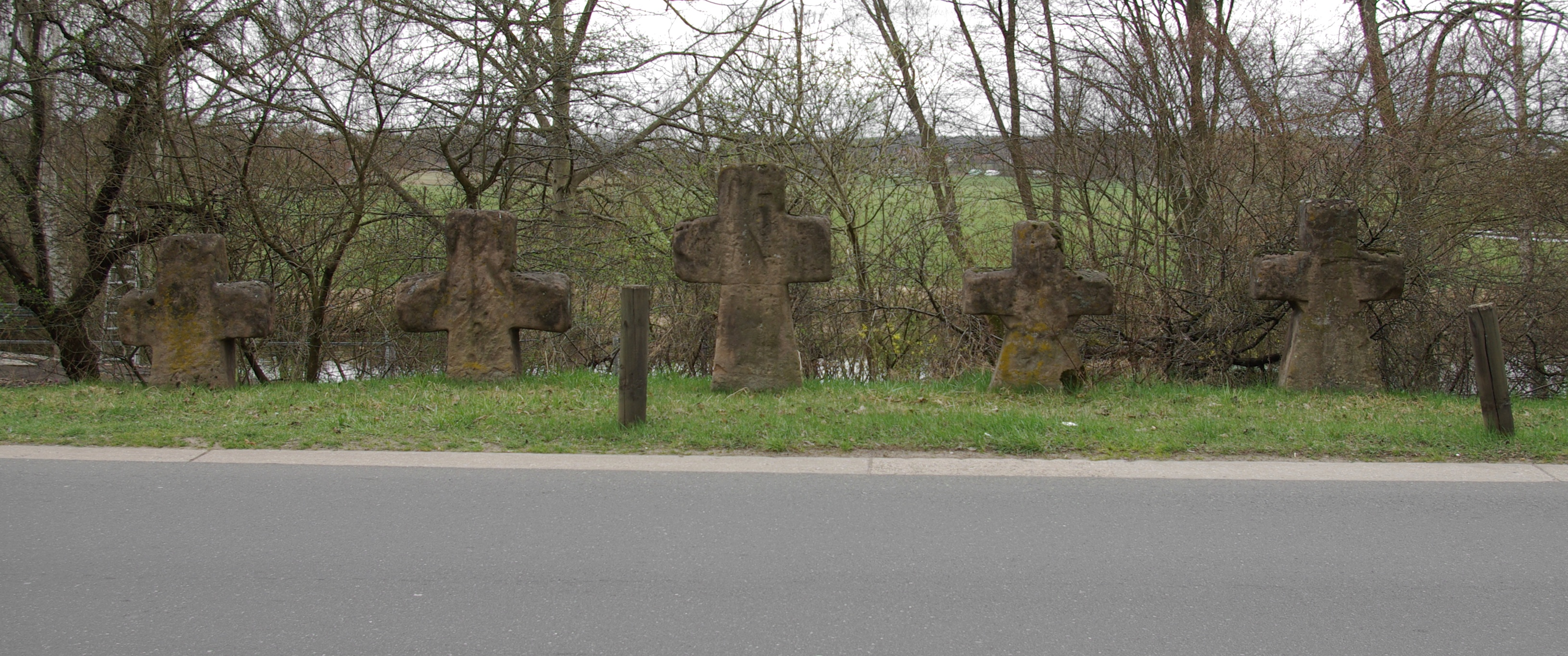 Die fünf mittelalterlichen Steinkreuze am südlichen Ortseingang des Erlanger Stadtteils Bruck. Das erste Kreuz ist ohne Zeichen, beim zweiten ist am Fuß ein Weberschiffchen eingemeißelt, am dritten Kreuz befinden sich Wetzrillen sowie am rechten Arm die Buchstaben PK. Das vierte Kreuz hat Armstützen und einige kleine Löcher. Das letzte Kreuz hat ebenfalls Armstützen und am Kopf ein kleines eingeritztes Kreuz. Sie werden die Schweden- oder Keltschensteine genannt. Sie sollen aus der Fehde des Fuhrmanns Kunz Keltsch stammen. Der Sage nach sollen hier fünf Knechte des Keltsch, die im Kampf mit Nürnberger Söldnern gefallen sein sollen, begraben liegen. Auch soll ein Richtschwert unter einem der Steine liegen. Ursprünglich standen die Steine in der Flur, seither wurden sie mehrmals umgesetzt.